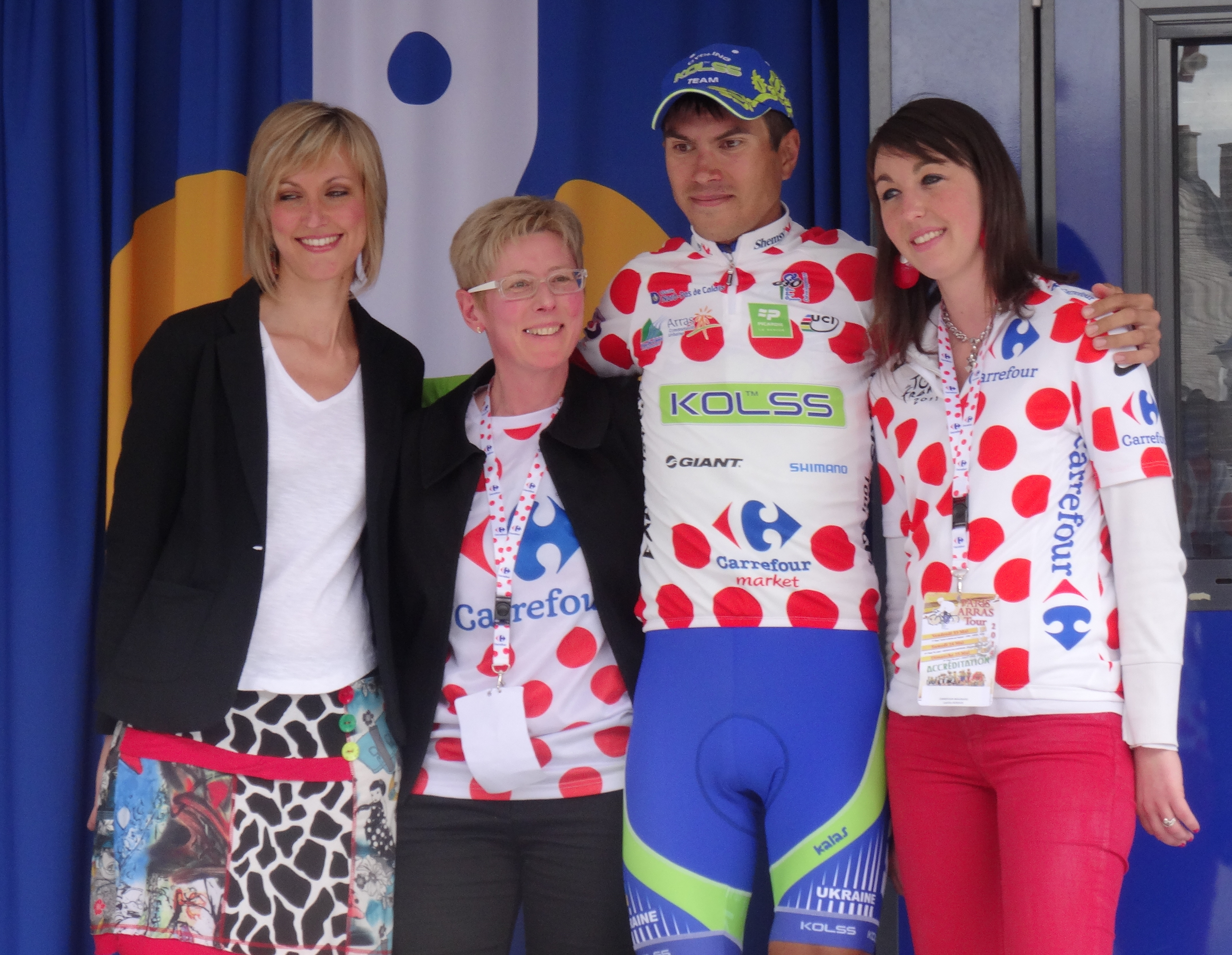 Reportage photographique réalisé le dimanche 25 mai 2014 à l'occasion du départ et de l'arrivée de la troisième étape du Paris-Arras Tour 2014 à Arras, Pas-de-Calais, Nord-Pas-de-Calais, France. Depicted person: Oleksandr Polivoda